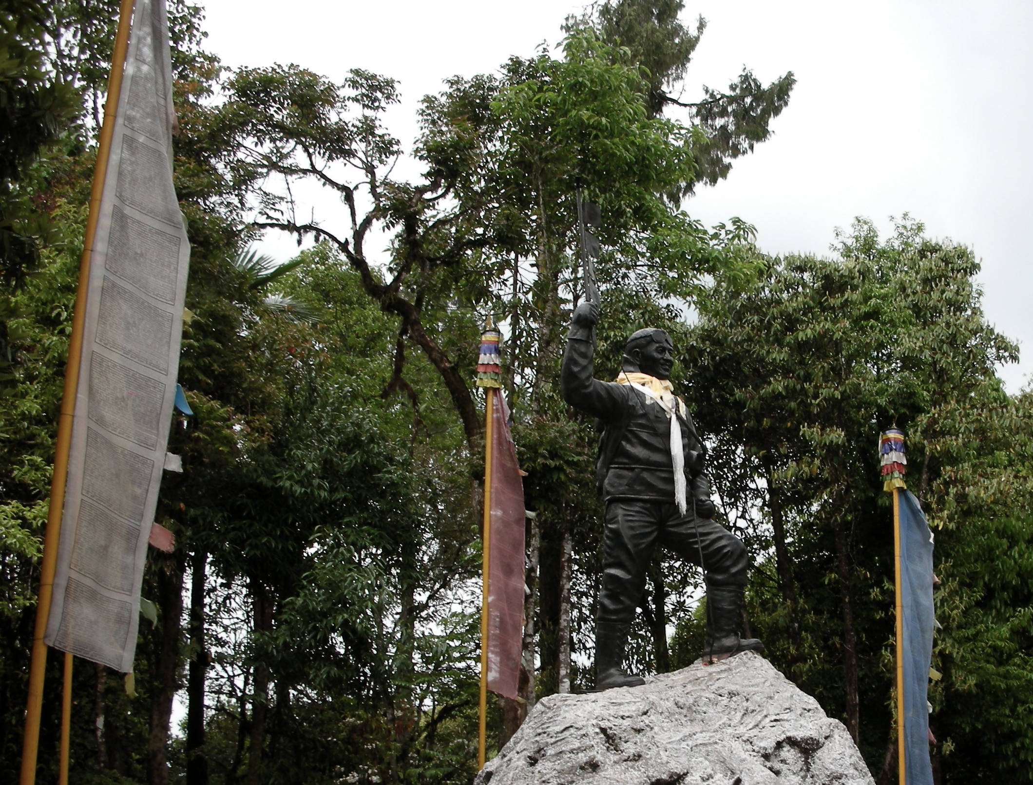 Беларуская (тарашкевіца): Статуя Норгэю ў Нэпале.